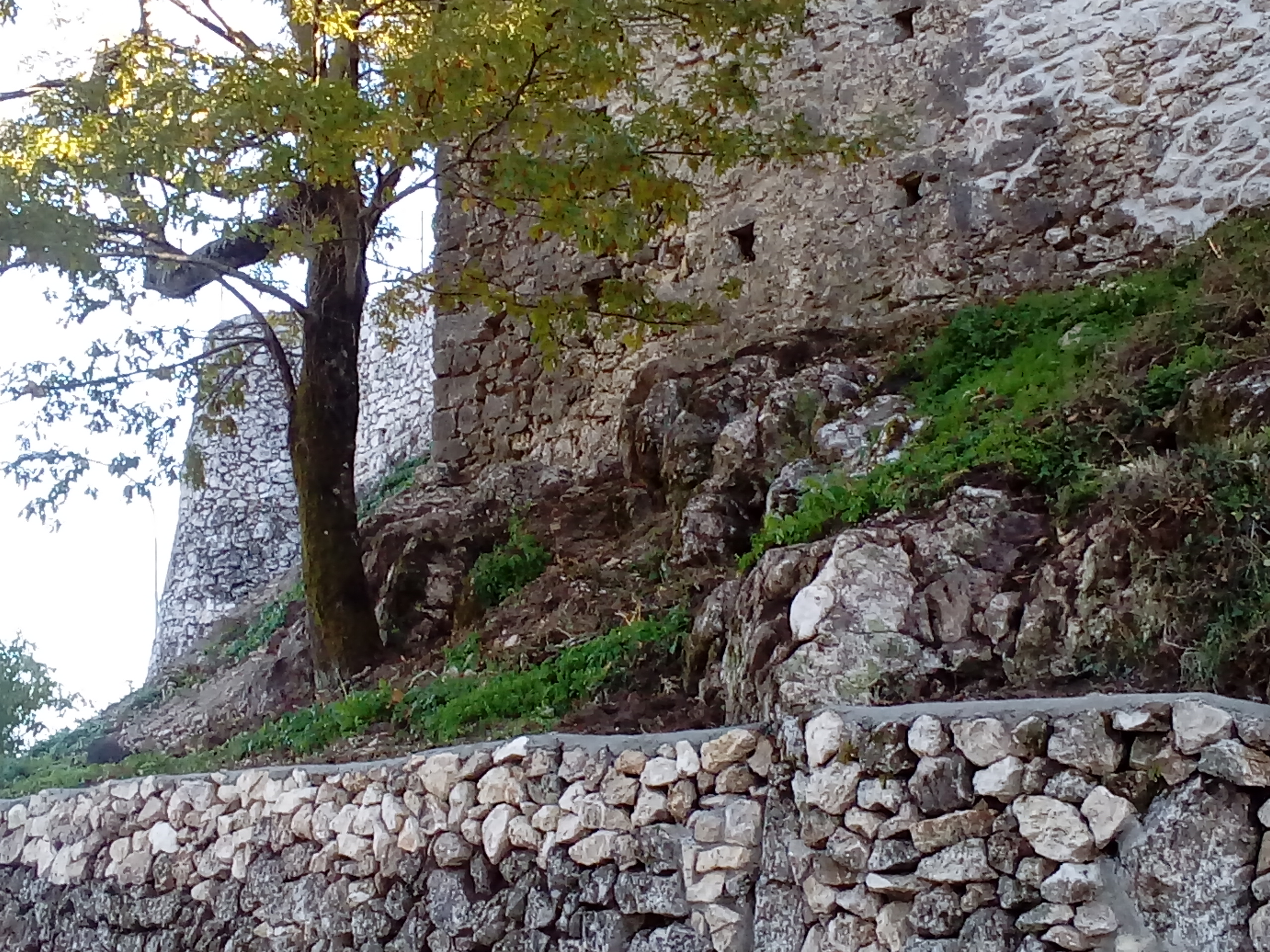 Acquafondata, Via merri, resti dell'opera di incastellamento del sec XI